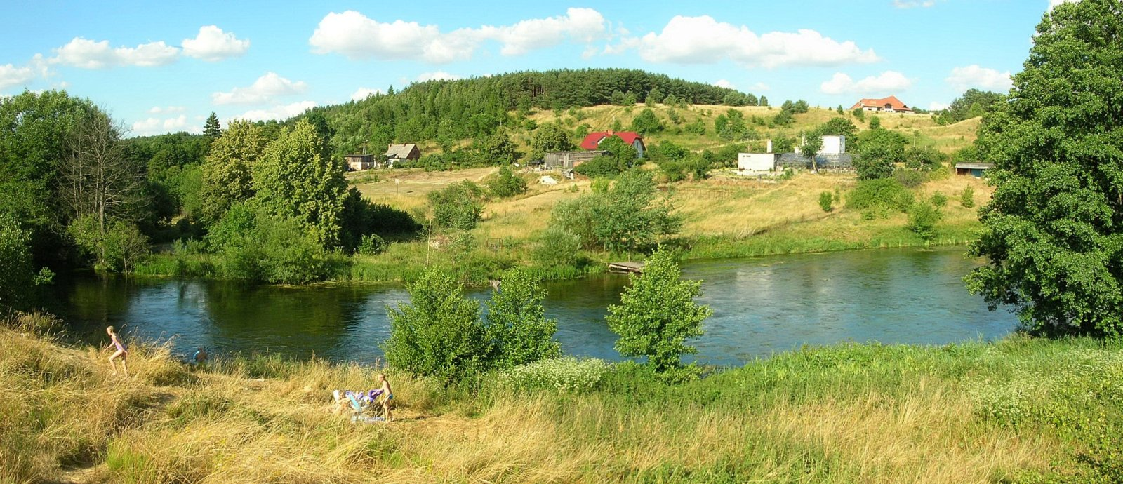 Brda w Bydgoszczy na osiedlu Opławiec